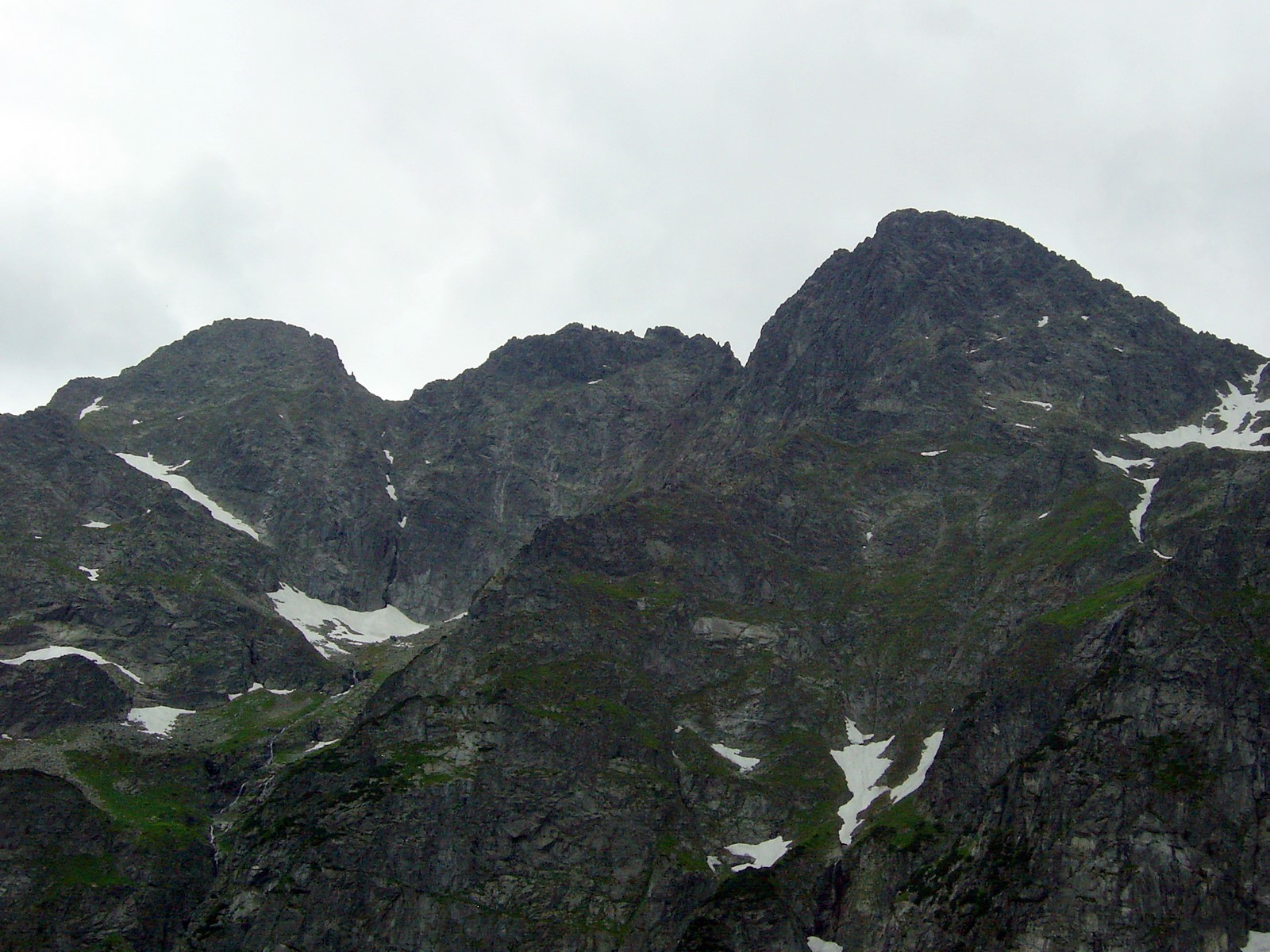 Mięguszowieckie Szczyty Czarny, Pośredni i Wielki znad Morskiego Oka